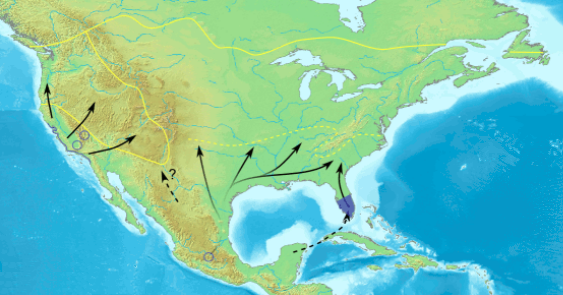 Wanderung und Verbreitung des Monarchfalters (Danaus plexippus) in Nordamerika (Animation)